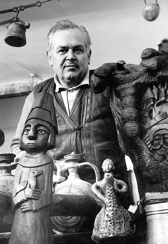 Živkovic Bogosav, Klasici naivne i marginalne umetnosti Srbije